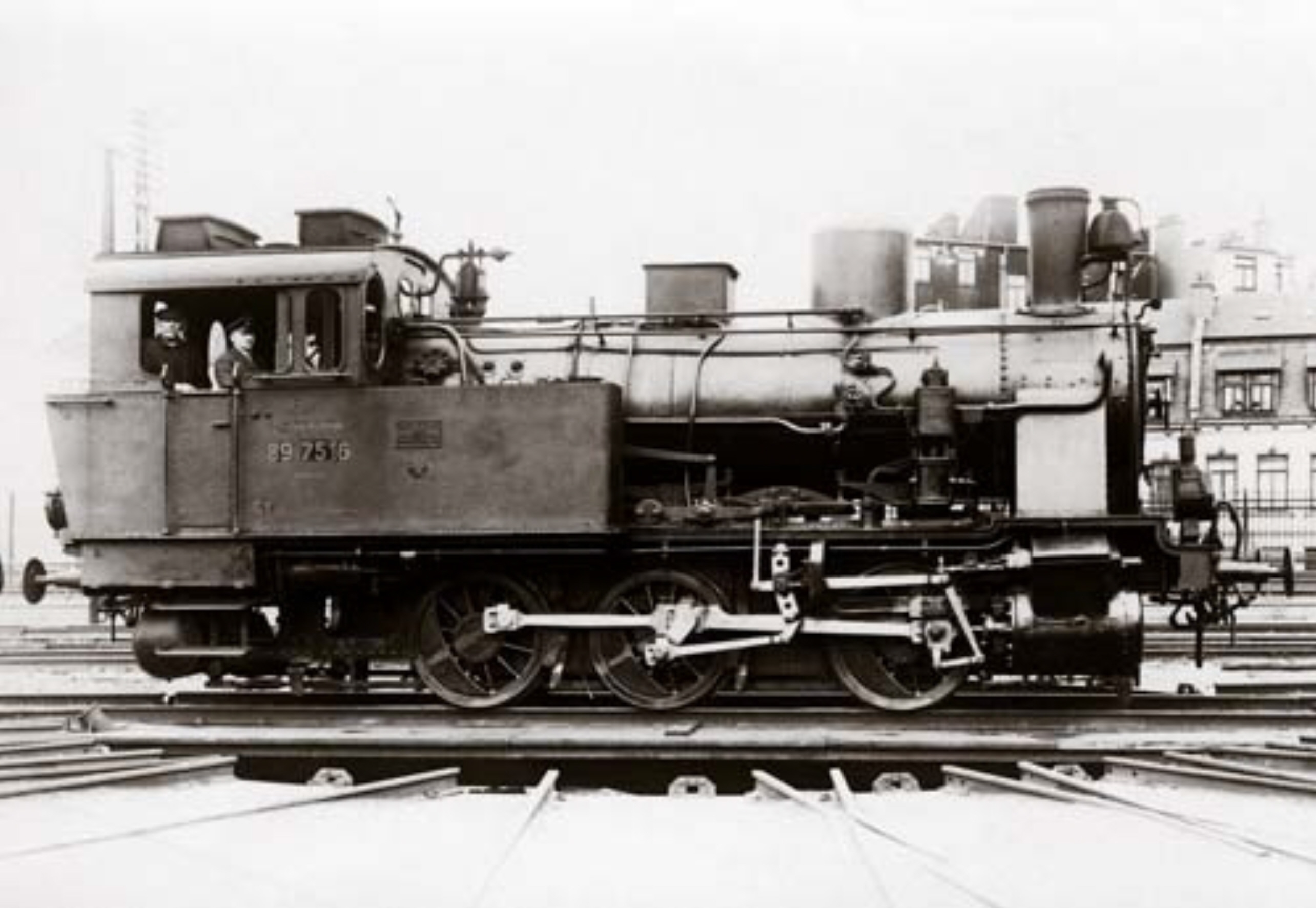 1915 bei Jung für die Bremischen Hafeneisenbahn (Nr. 14) gebaute Tenderlokomotive; 1930 als 89 7516 zur Deutschen Reichsbahn; 1945 an die Neukölln-Mittenwalder Eisenbahn (Nr. 1); Verbleib unbekannt. Aufgenommen im Bahnbetriebswerk Bremen-Walle.